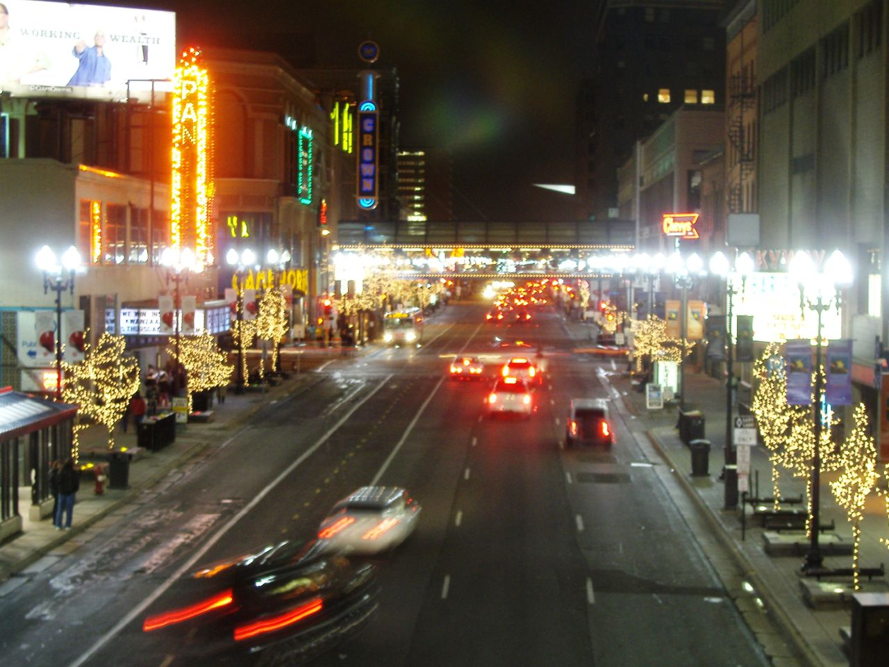 Hennepin Avenue, Minneapolis, Minnesota